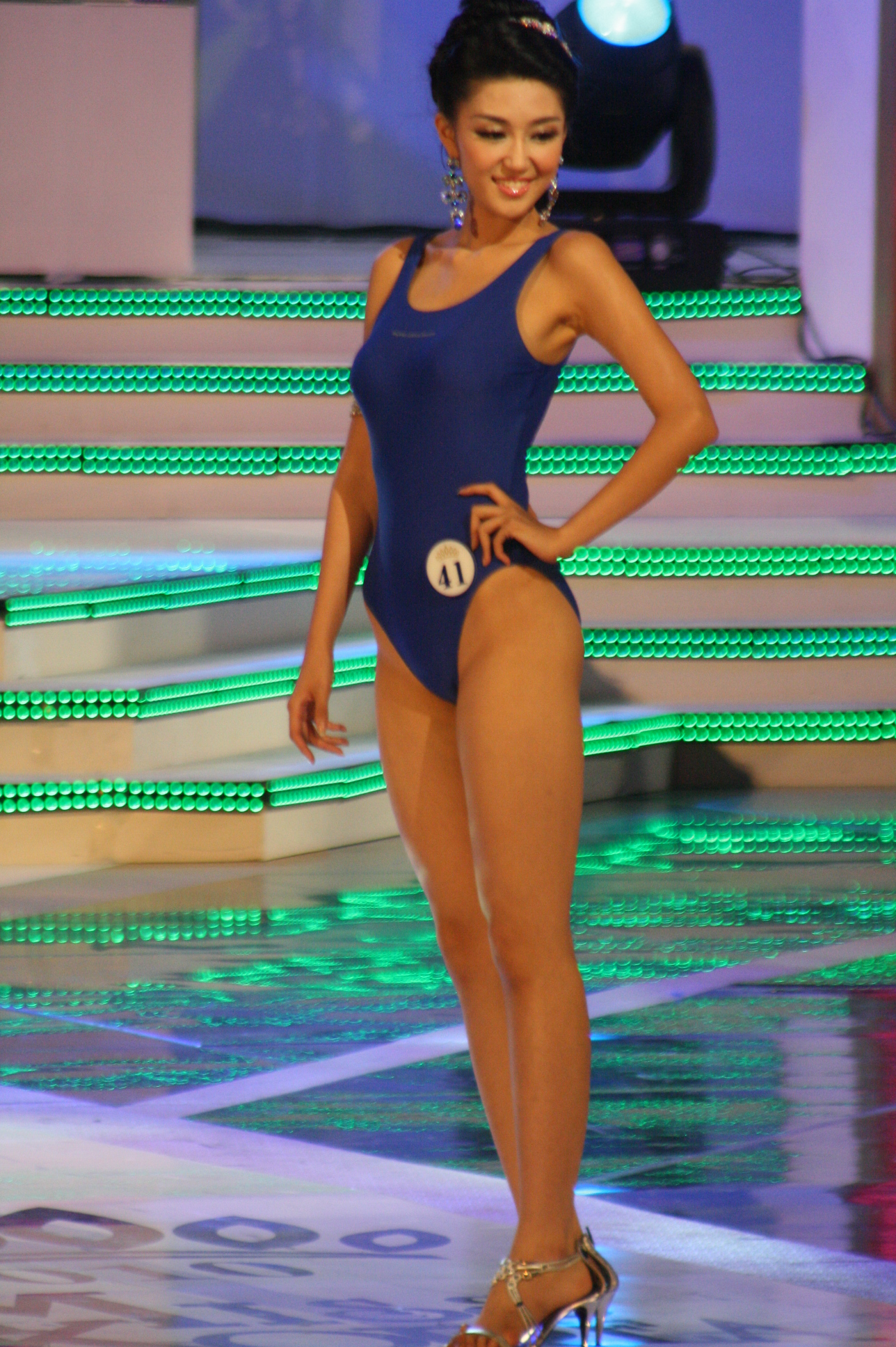 2010 미스코리아 선 김혜영(경북 진) 수영복 심사